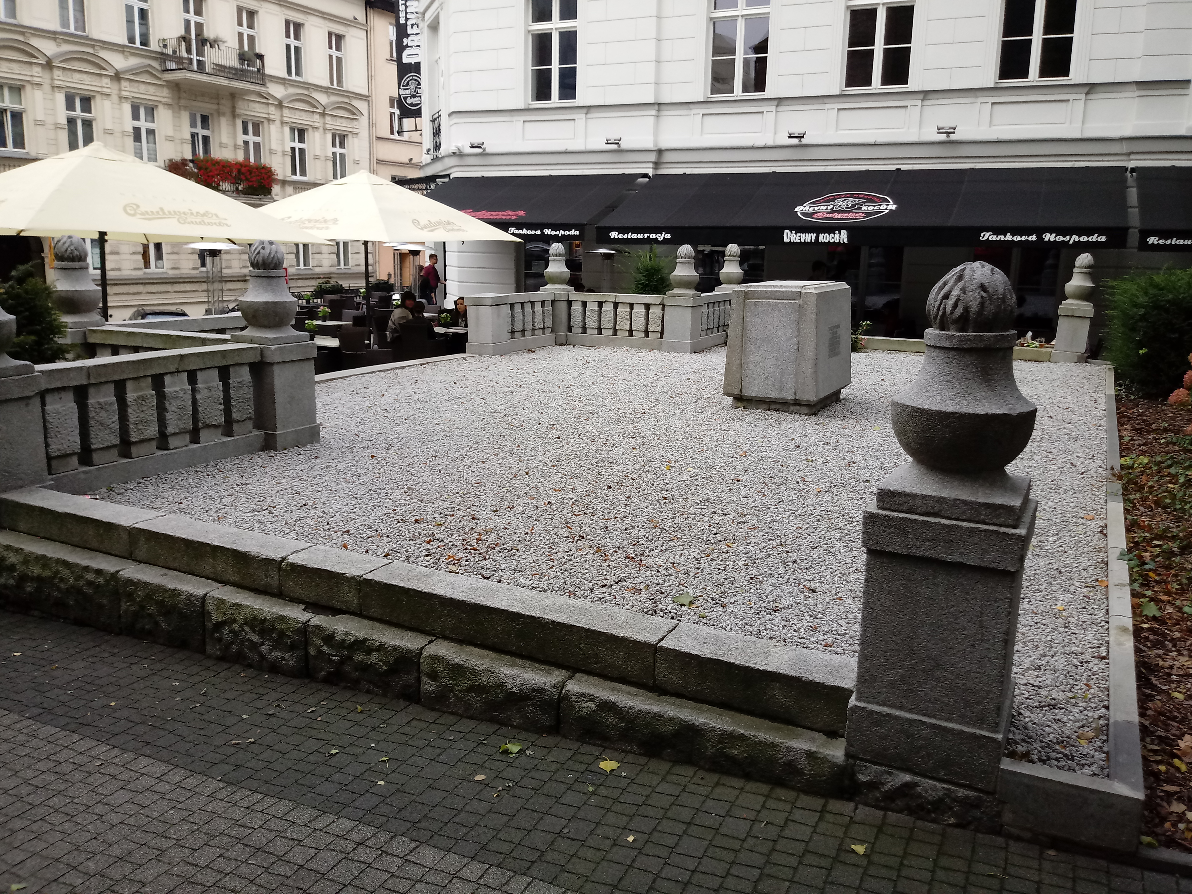 Tak wygląda obecnie miejsce po pierwszym pomniku Adama Mickiewicza w Poznaniu